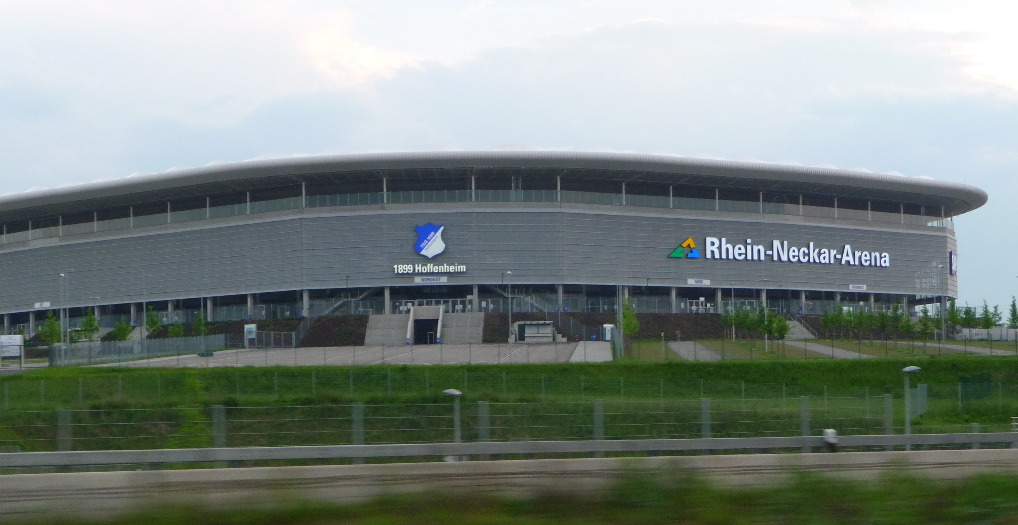 Rhein-Neckar-Arena in Sinsheim (Baden-Württemberg, Deutschland)